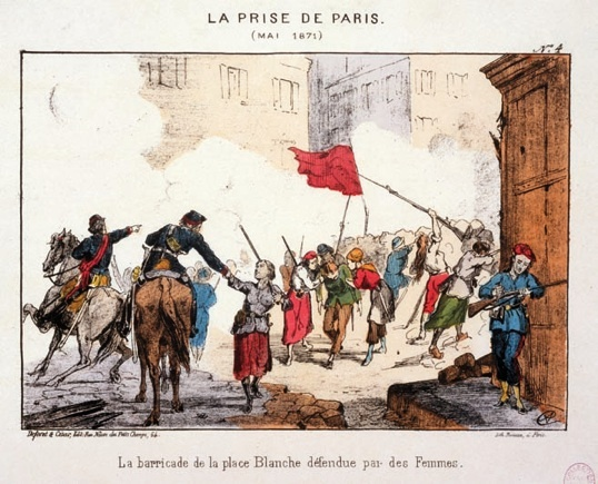 Lithographie, musée Carnavalet, Paris.